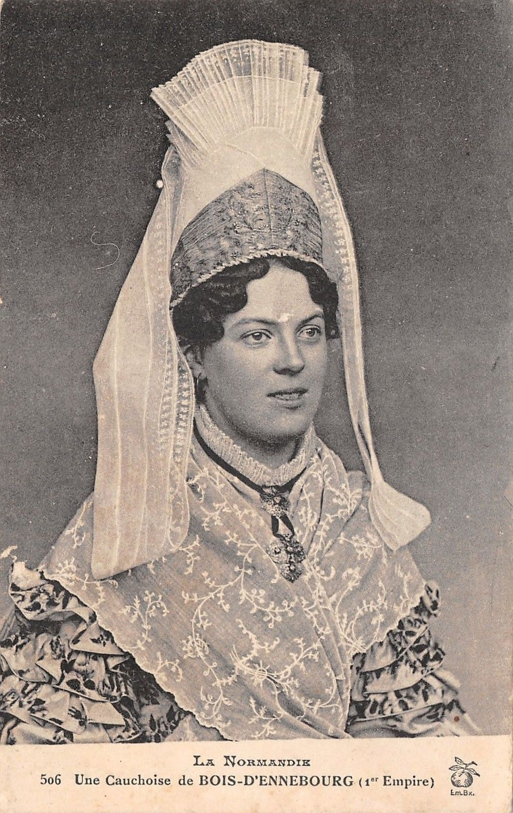 Coiffe du Pays de Caux de la région de Bois-d'Ennebourg début XIXe. CPA.